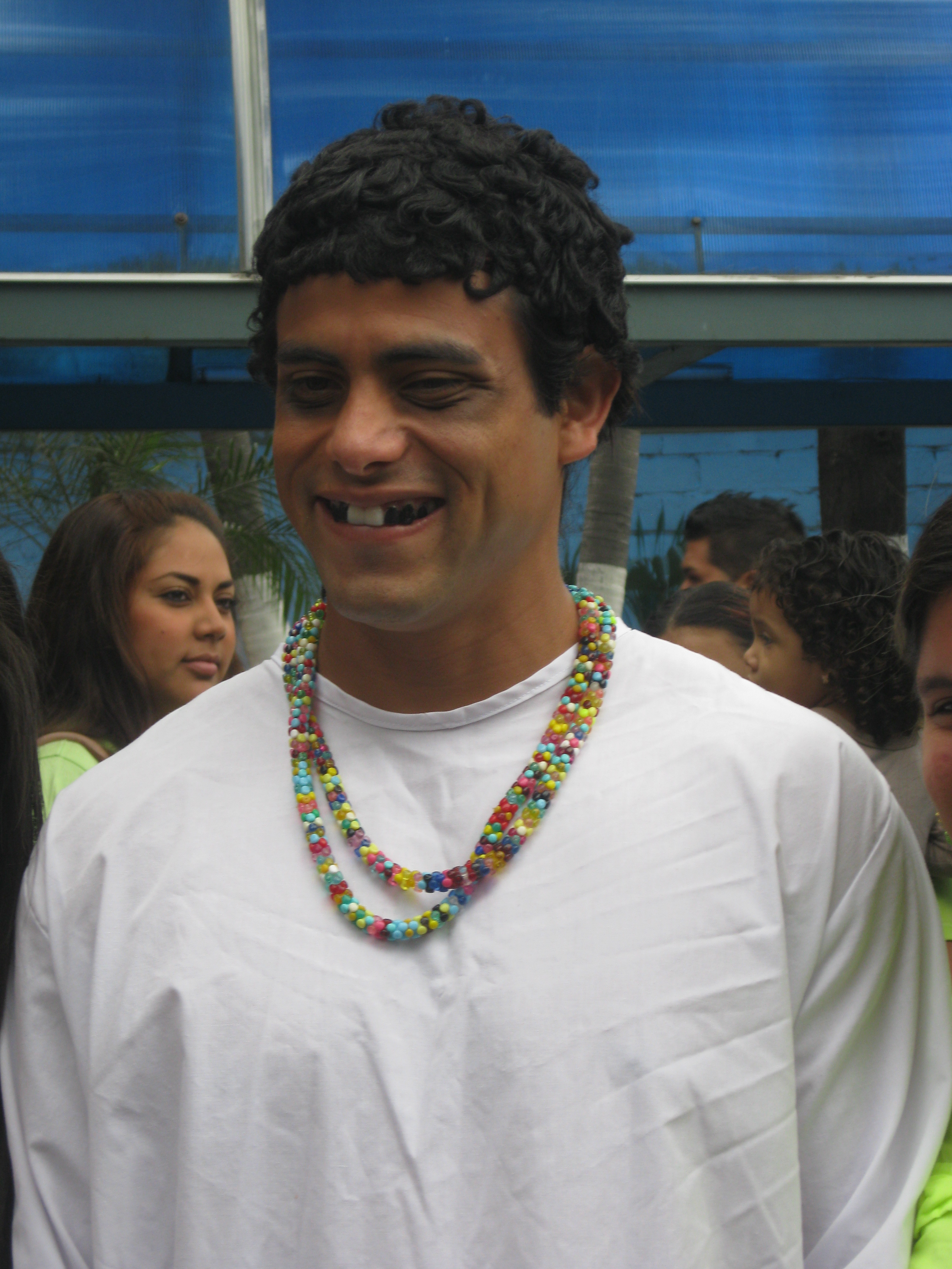 Lorenzo, personaje del programa de variedades de Ecuavisa, "En Contacto", interpretado por el músico y actor Efraín Ruales.